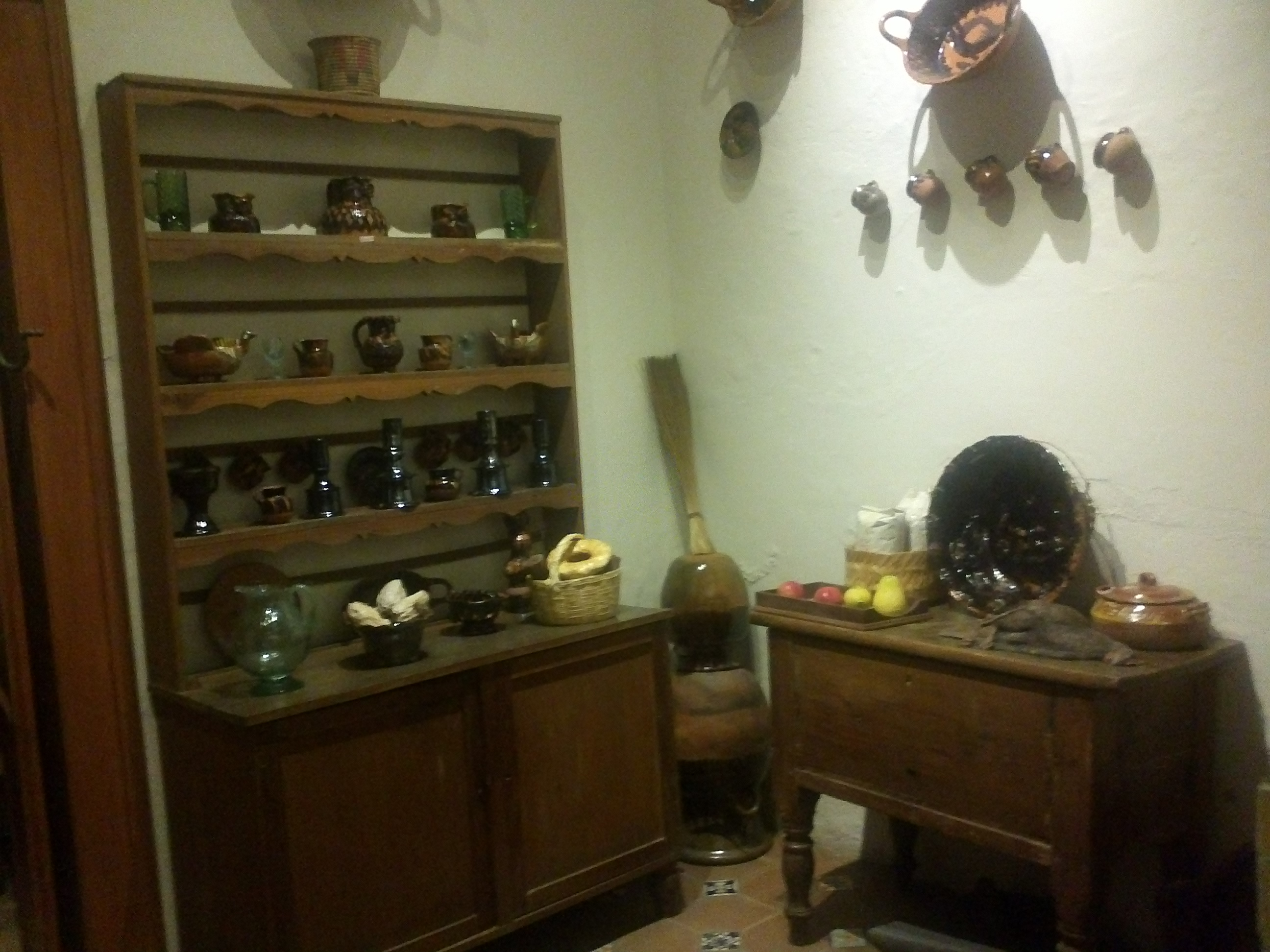 Cocina Casa de Aquiles Serdán, Puebla